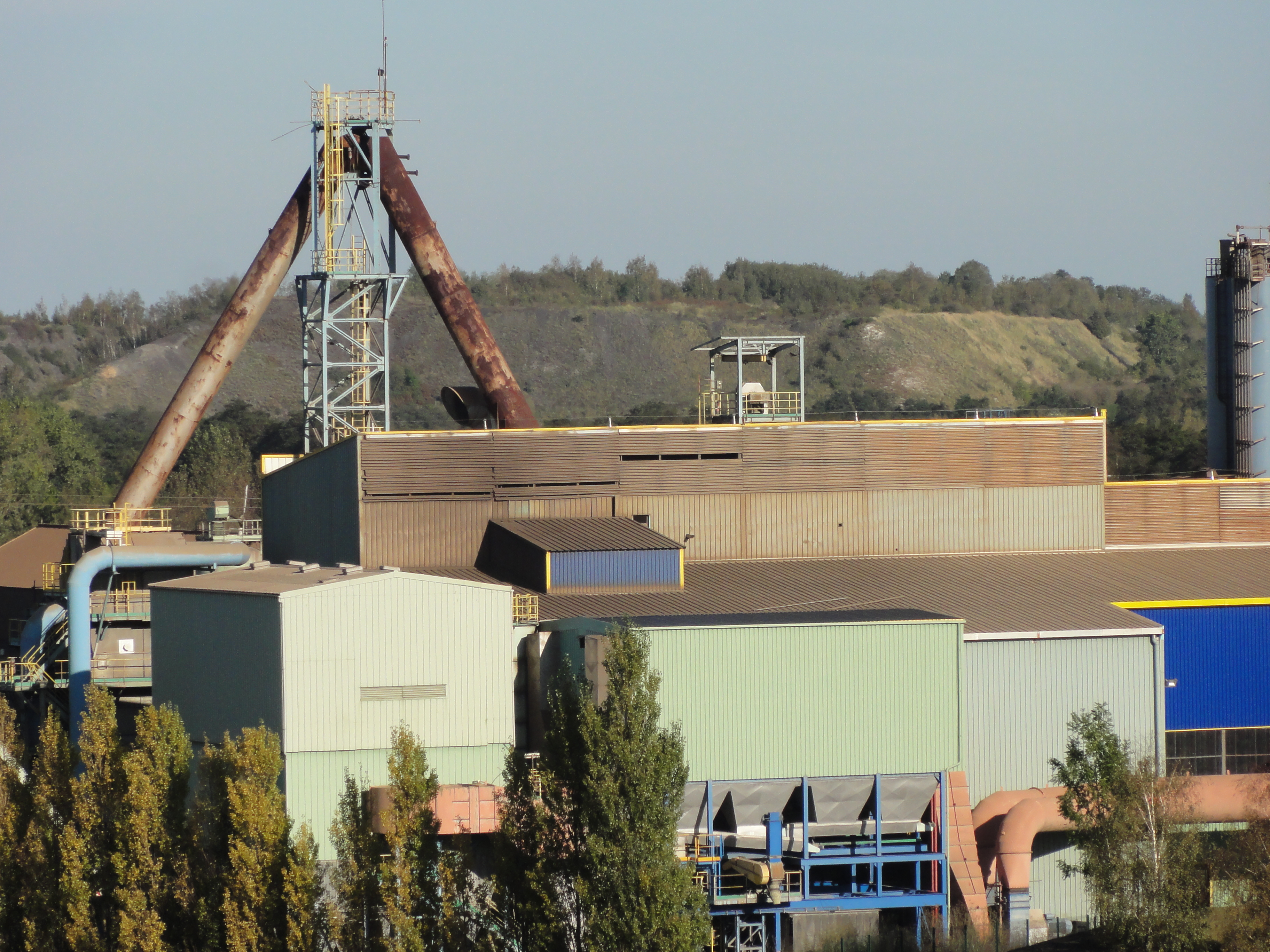 Terrils nos 83, 100 et 230 dits 7 - 19 Marais, Décharge Marais de Fouquières et Remblais Marais de Fouquières, Fosse n° 7 - 19 de la Compagnie des mines de Courrières, Fouquières-lez-Lens, Pas-de-Calais, Nord-Pas-de-Calais, France.